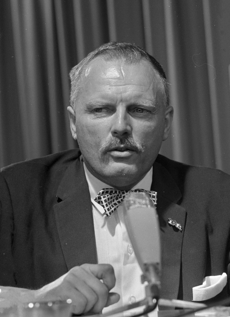 C. Berkhouwer (2e Kamerlid VVD) bij zijn terugkeer uit Indonesie op Schiphol.